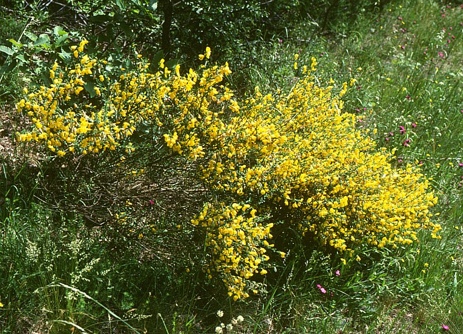 Besenginster (Cytisus scoparius), Hülsenfrüchtler (Fabaceae), Schmetterlingsblütler (Faboideae) - Österreich/Austria/Autriche: Steiermark, Sausal, Demmerkogel